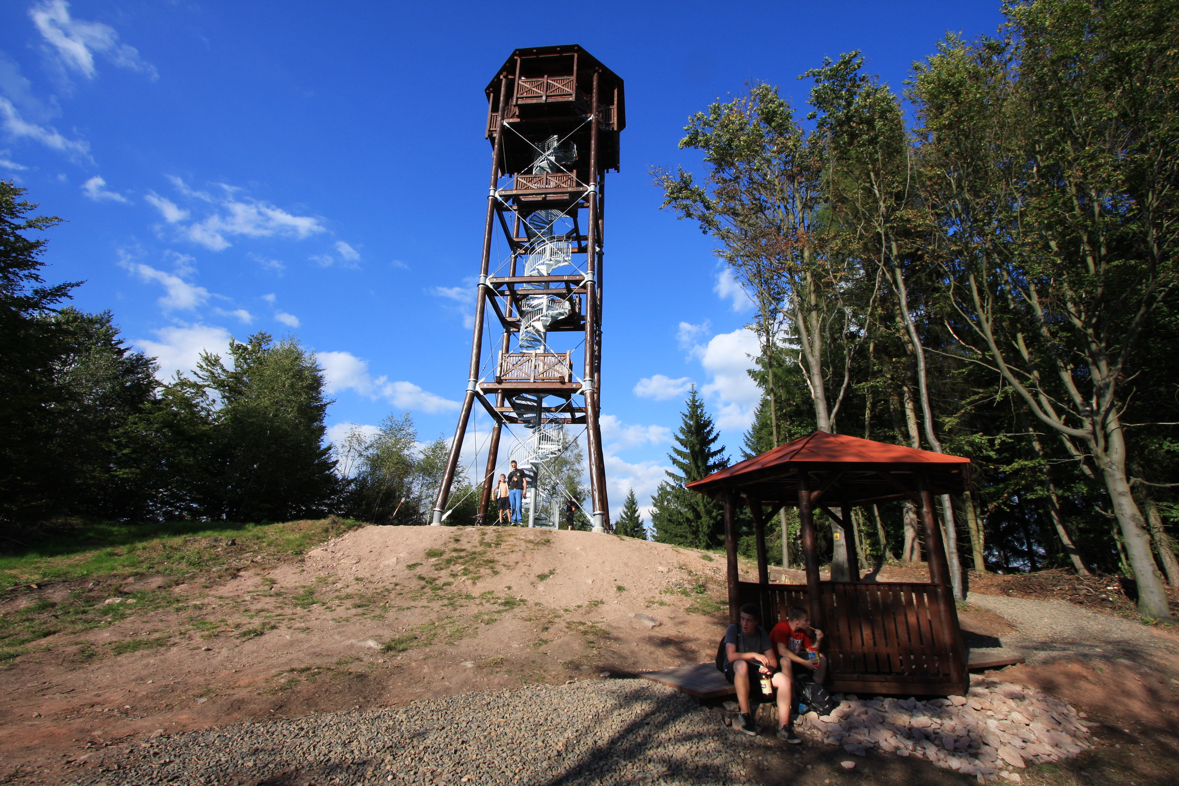 Slavětínská rozhledna, rozhledna a altán Na Markoušovickém hřebeni, Slavětín, okres Trutnov, Česká republika.